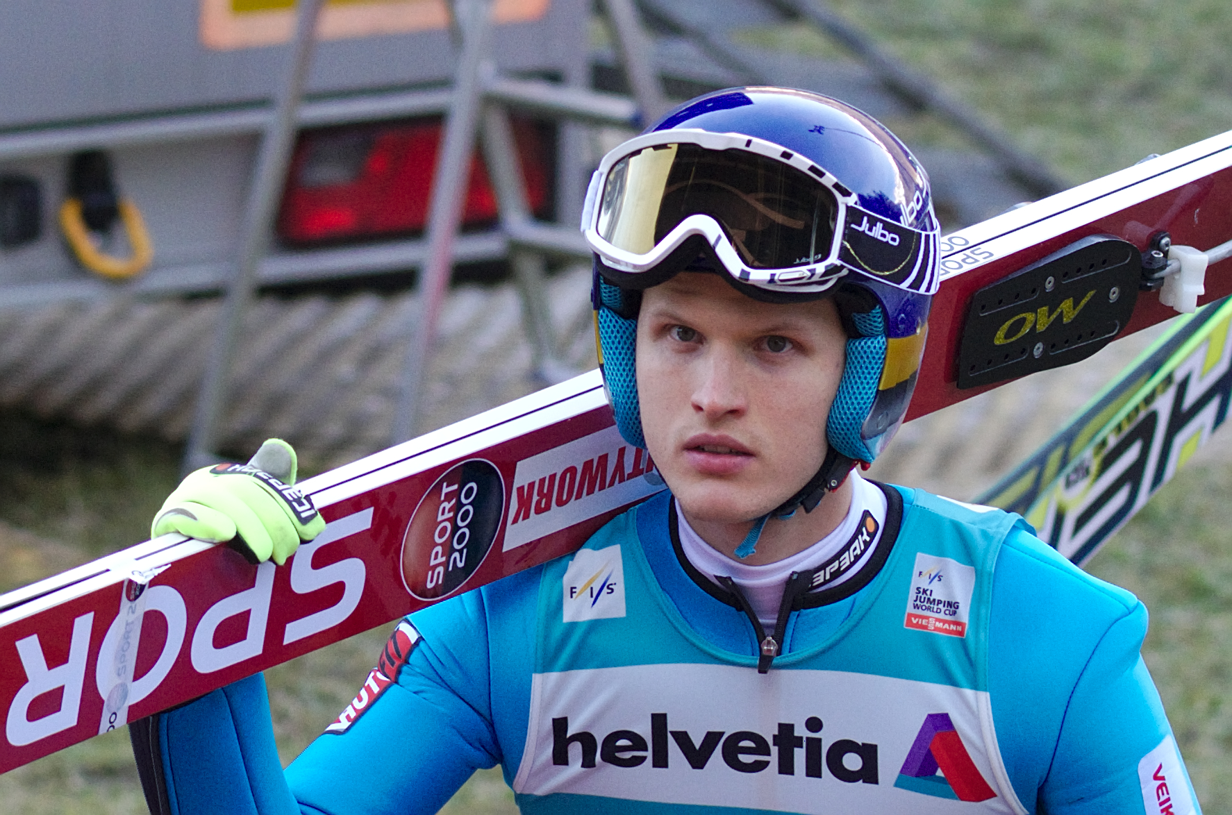 FIS Ski Jumping World Cup 2014 - Engelberg - 20141221 - Lauri Asikainen